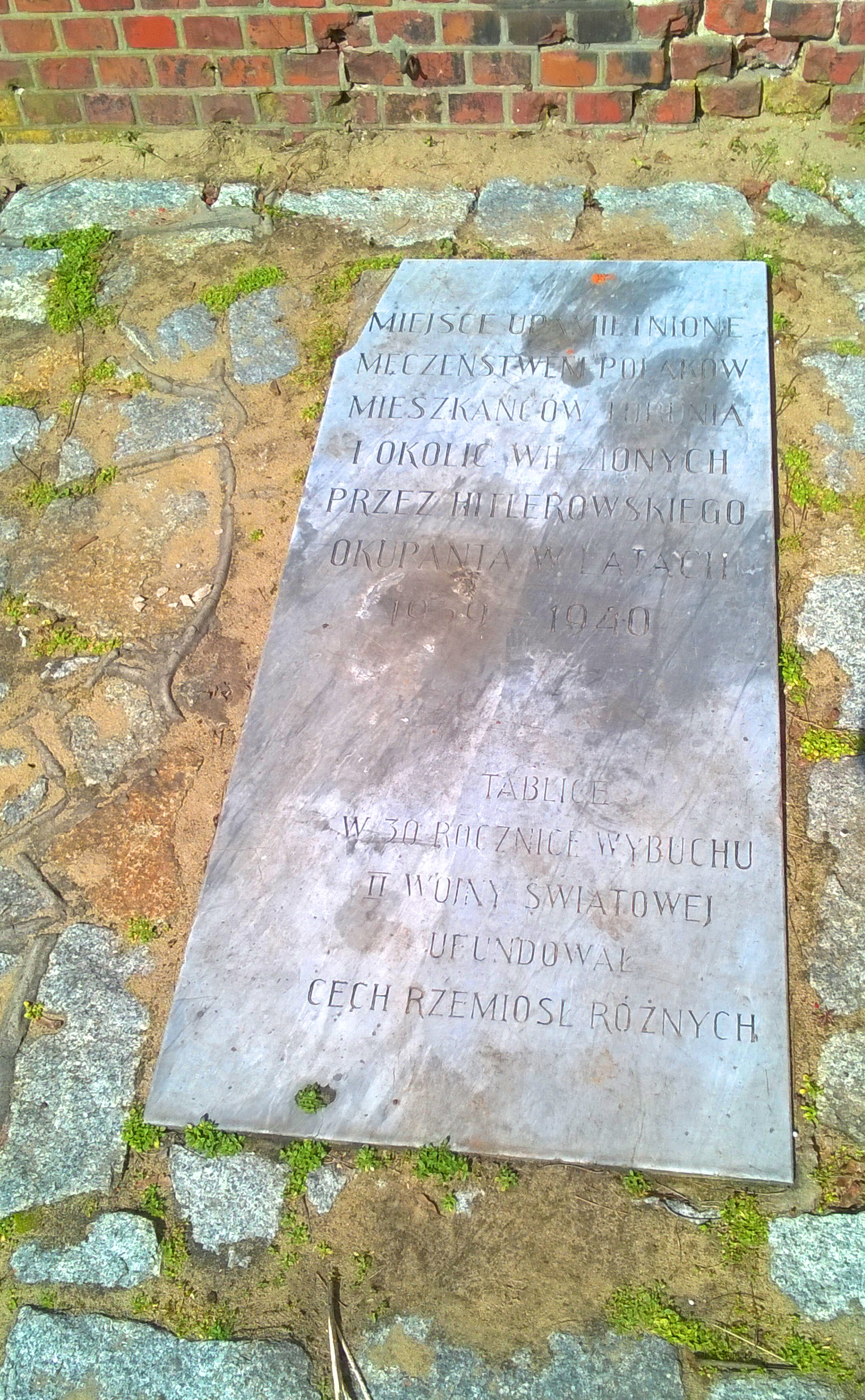 Fort VII Twierdzy Toruń3